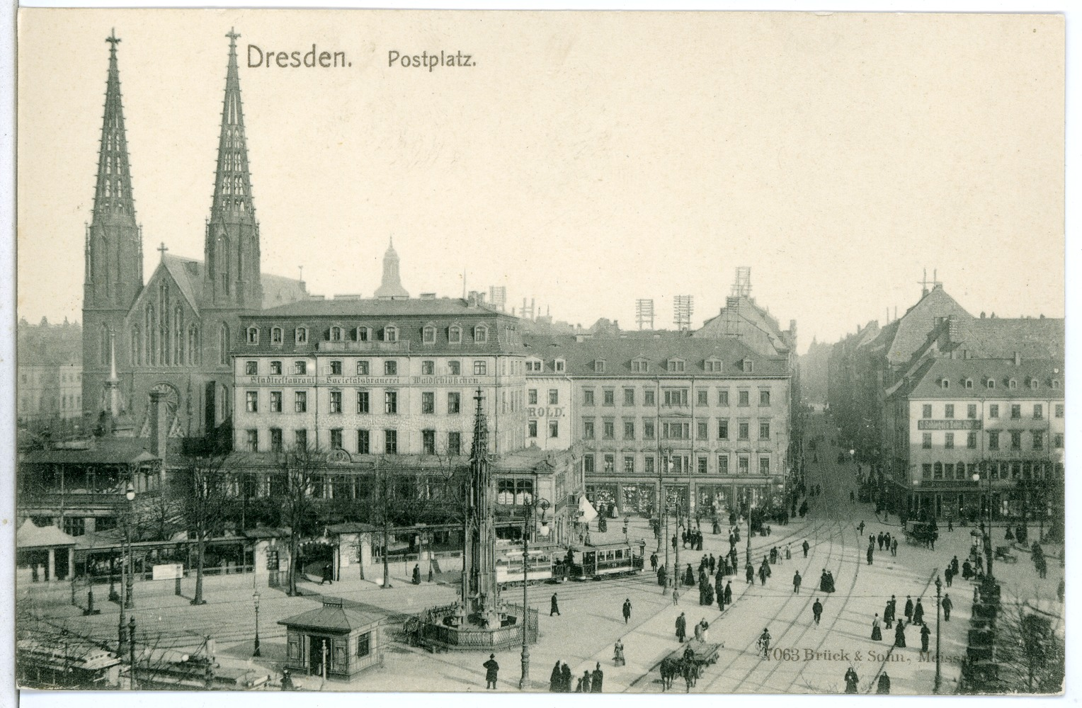 Dresden; Postplatz This postcard is from publisher Brück & Sohn in Meißen ( postcard has a unique number 07063 and is available in a higher resolution at the publisher. This images was uploaded in a cooperation project between Wikipedians and the publisher.